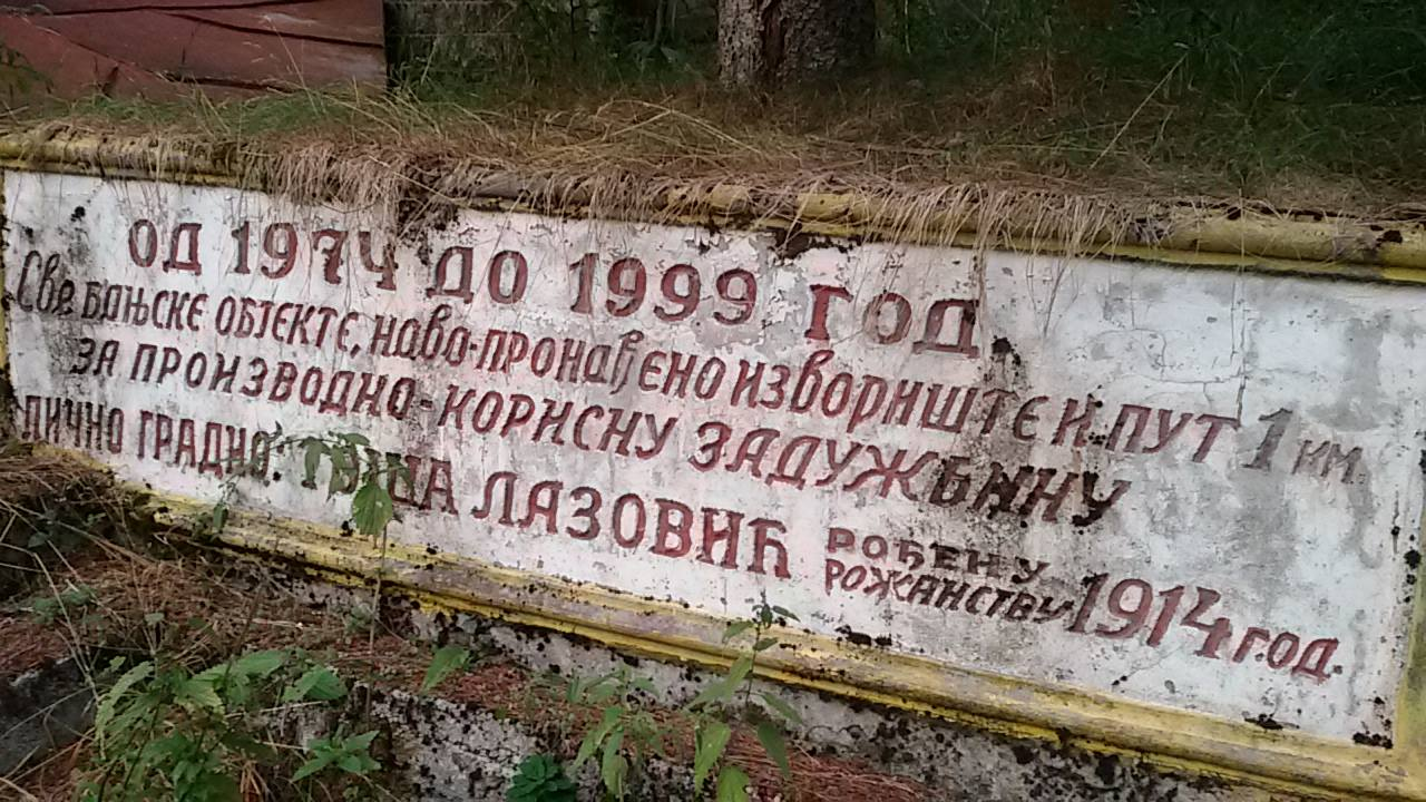 Српски (ћирилица): Тошина бања